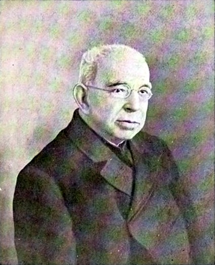 Retrat de Jaume Nonell i Mas